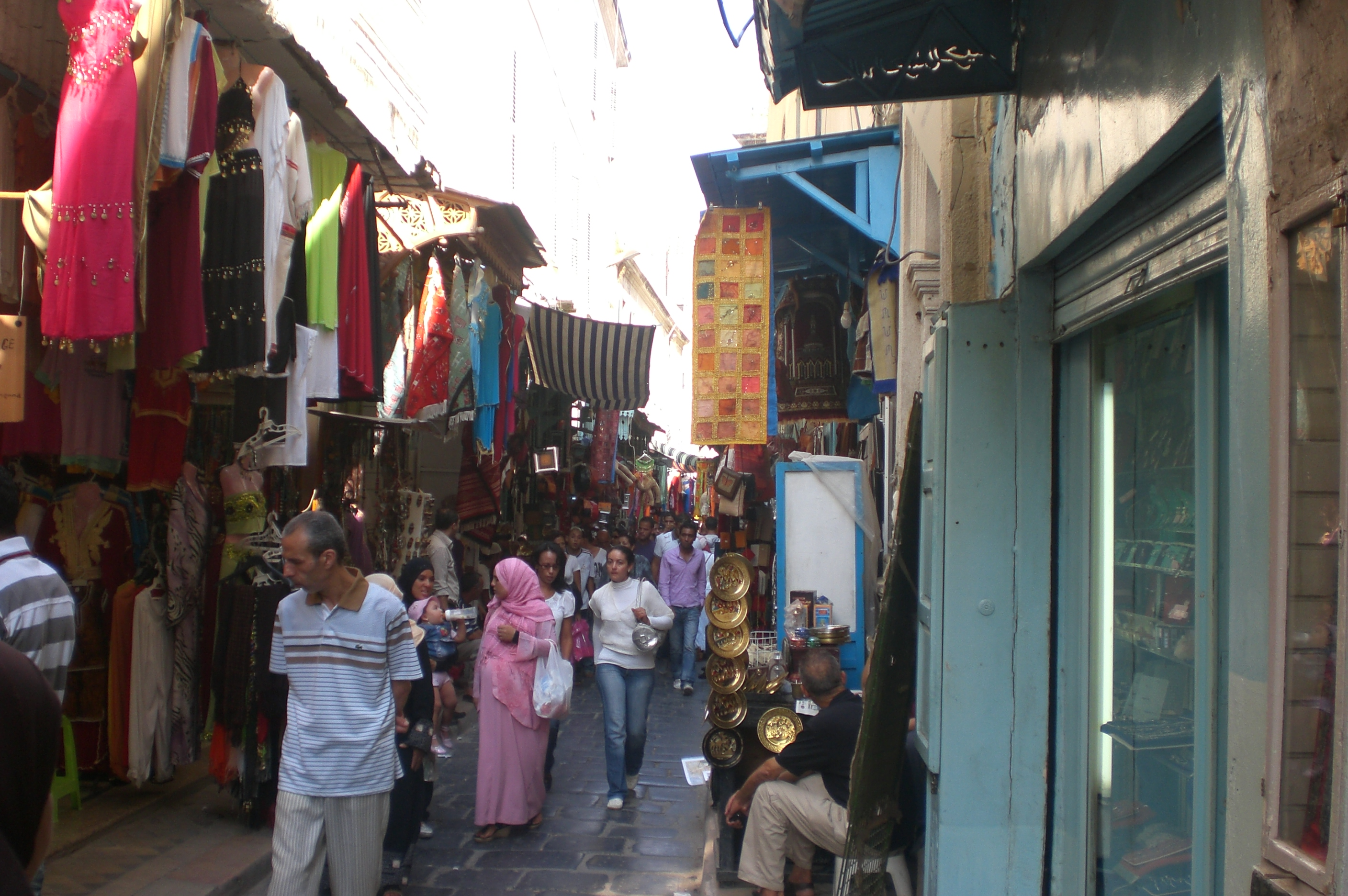 Rue Djemaa Zitouna-Tunis